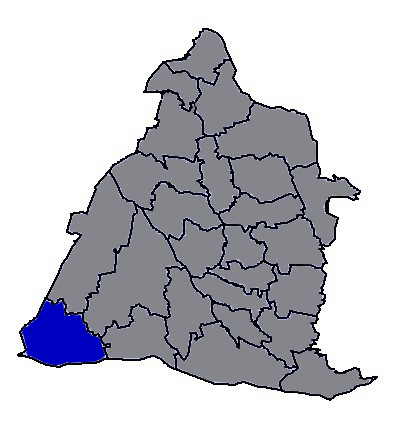 臺灣省彰化縣大城鄉。